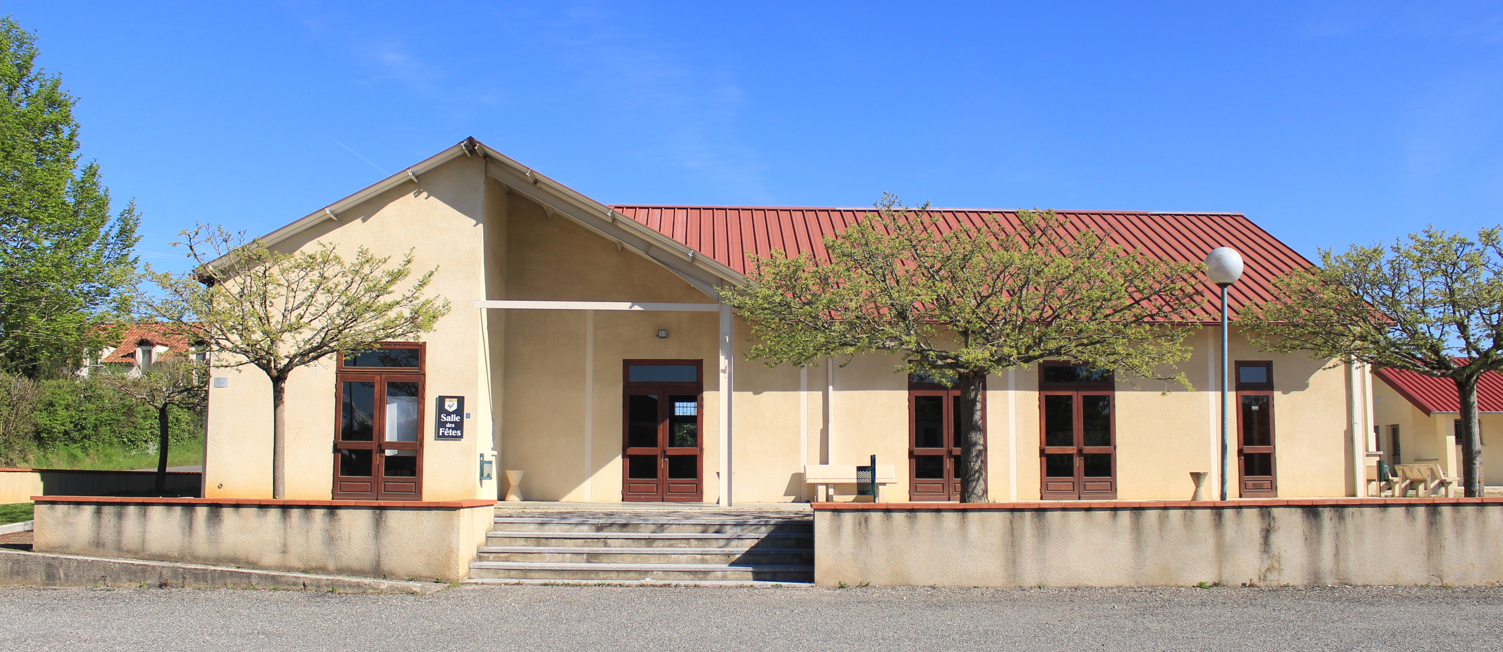 Salle des fêtes de Boulin (Hautes-Pyrénées)